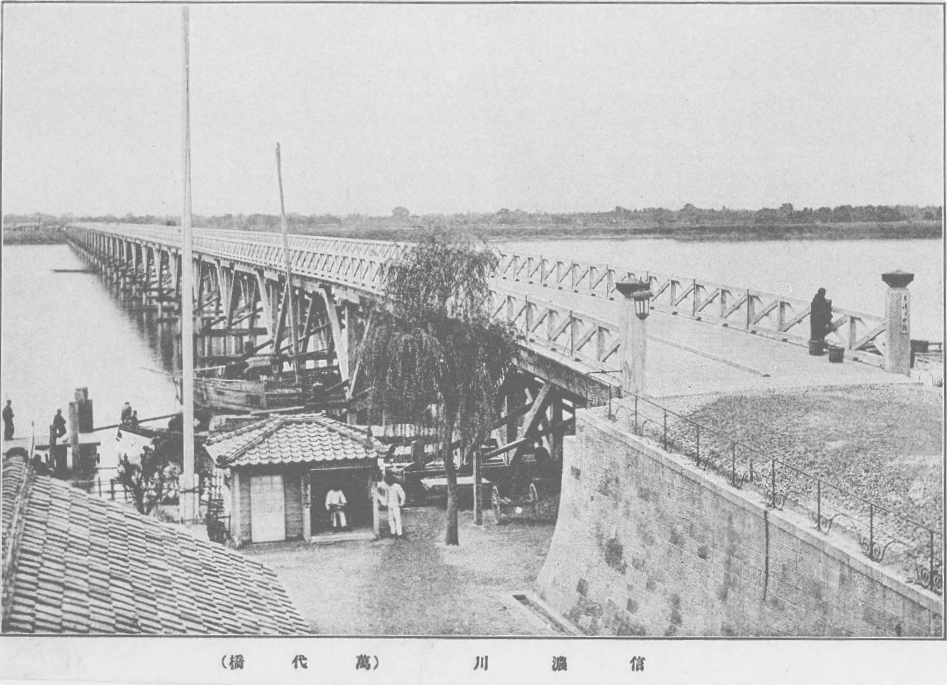 萬代橋（初代）新潟県, 1900年頃